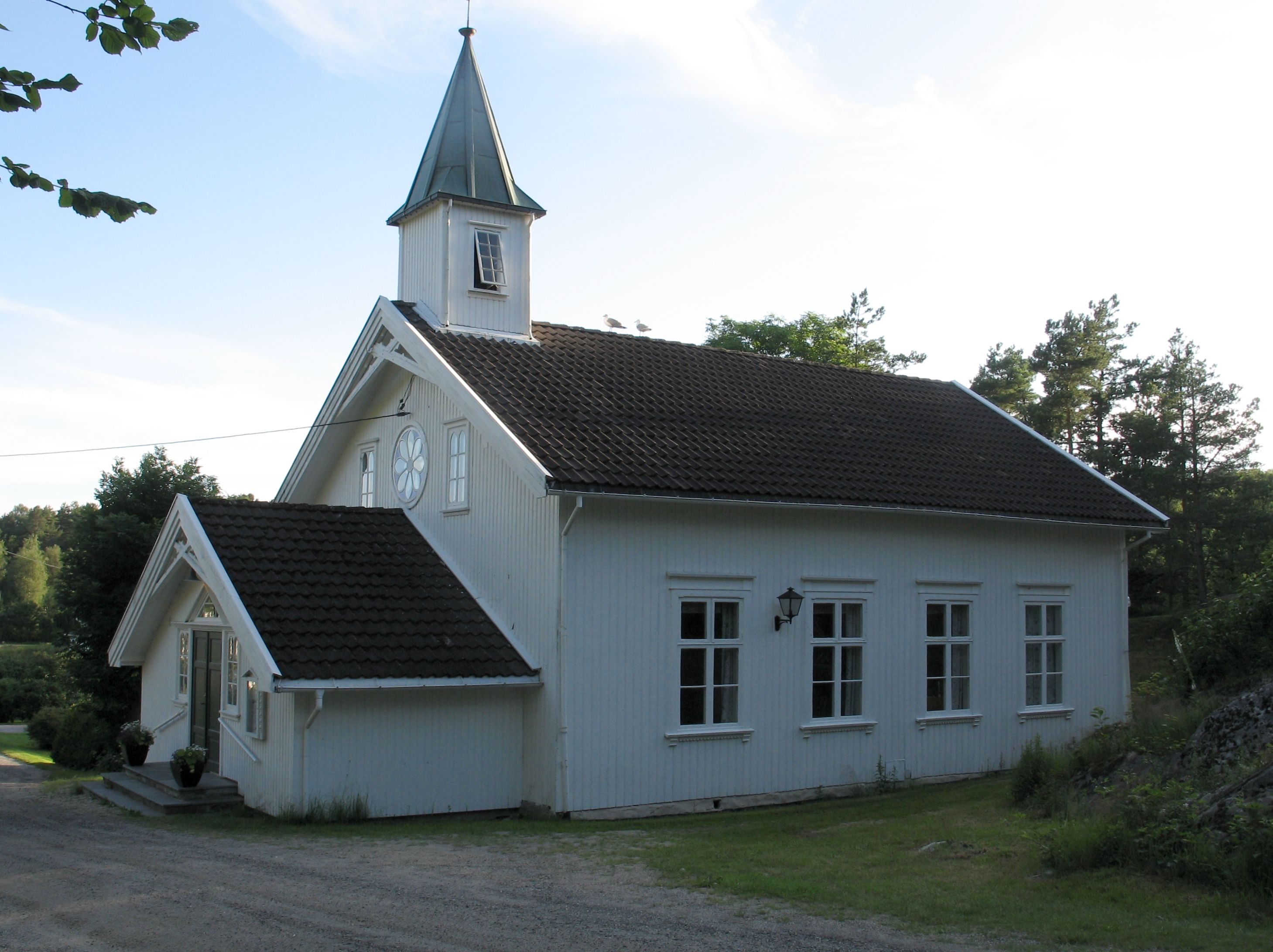 Justøy kapell, Lillesand